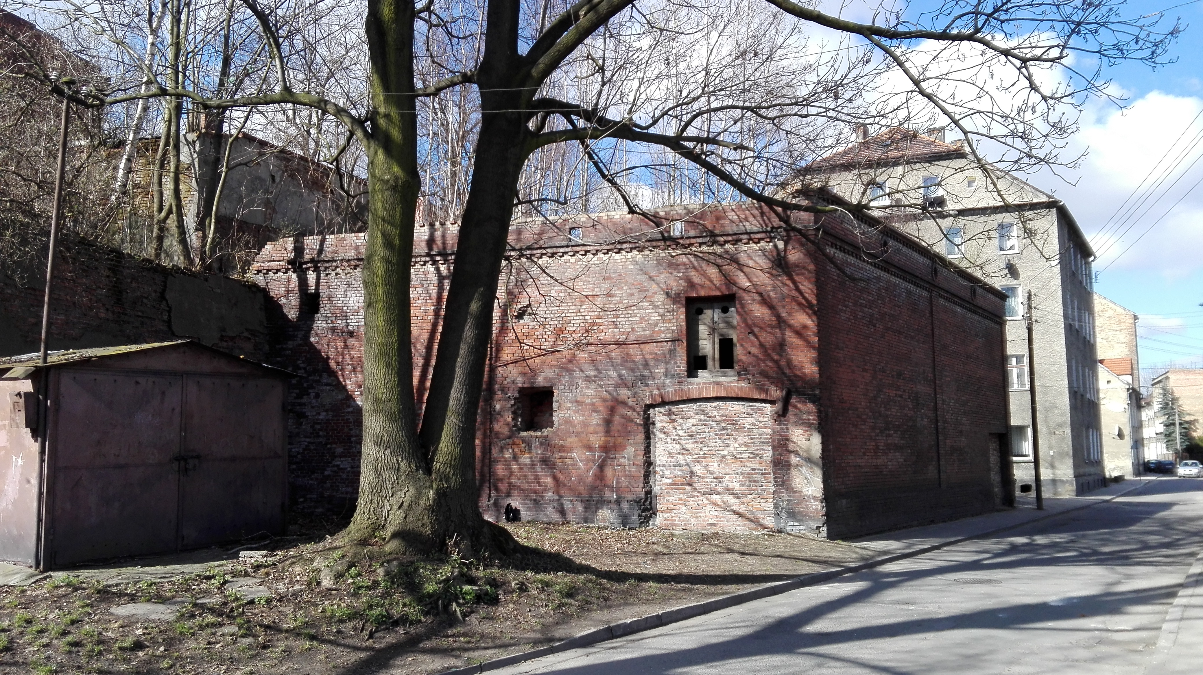 Prudnik, opuszczony XIX-wieczny browar i słodownia A. Heidricha — widok od ulicy Bolesława Chrobrego